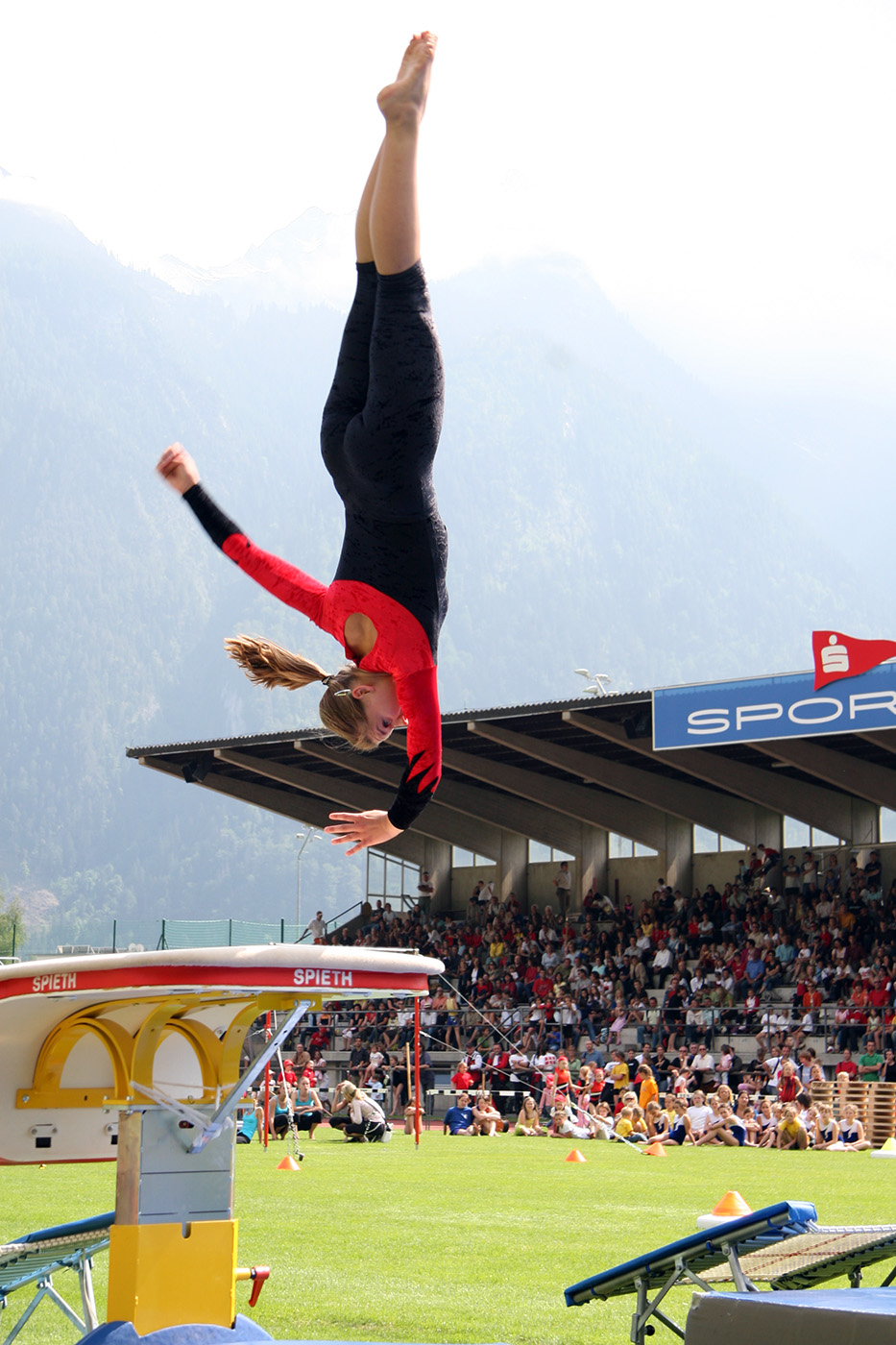 Team-Turnerin am Sprungtisch beim Landesjugendturnfest der Vorarlberger Turnerschaft 2007 in Bludenz, Stadion Unterstein.